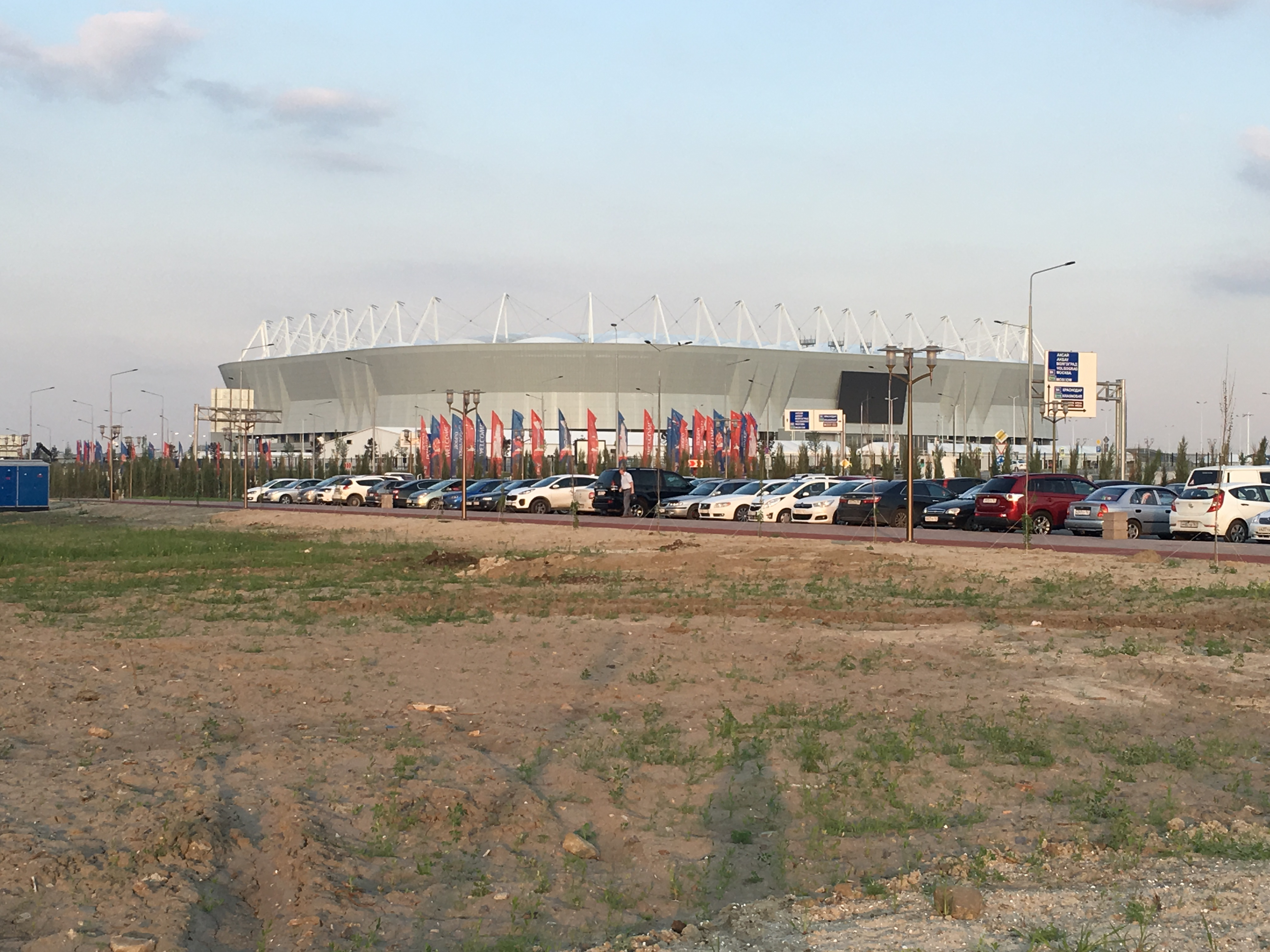 Ростов-на-Дону, вид из парка "Левобережный" на стадион "Ростов-Арена" (IPHONE)